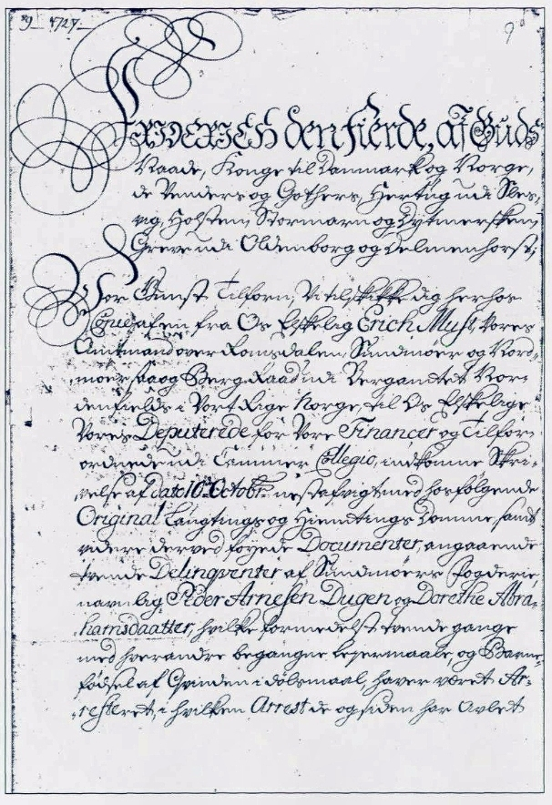 Første side av brevet av 19.12.1727 frå kong Fredrik IV i Købehavn, der han befaler at saka mot «Peder Arnesen Dugen og Dorethe Abrahamsdaatter» skal handsamast i overhoffretten. Faksimile frå side 127 i boka «Vargtid» av Astor Furseth.